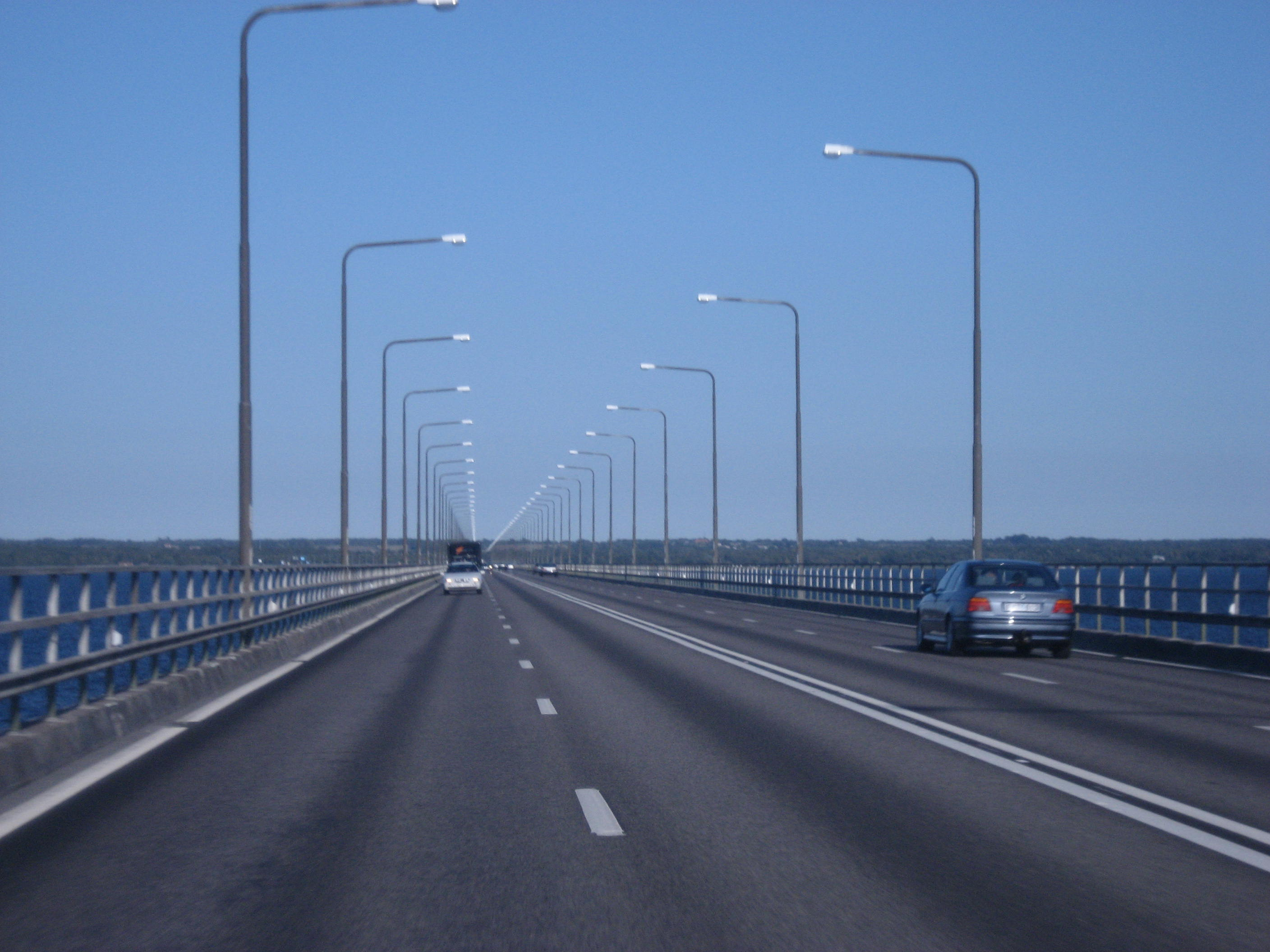 Foto. Tallium